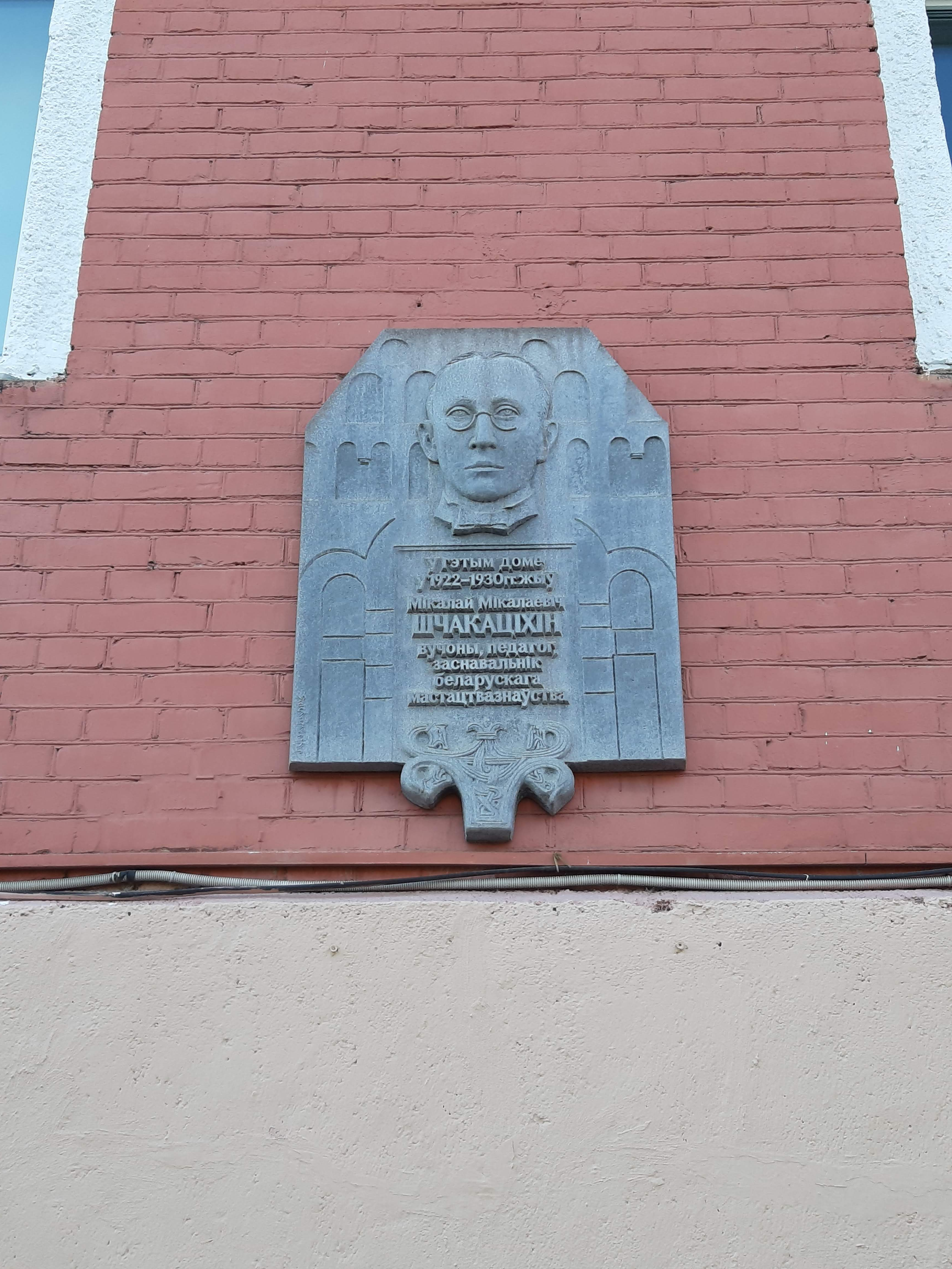 Мінск. Дошка Шкачаціхіну